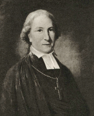 Olof Bjurbäck (1750-1829)